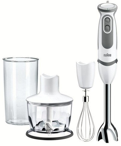 Batidora de mano con sus accesorios